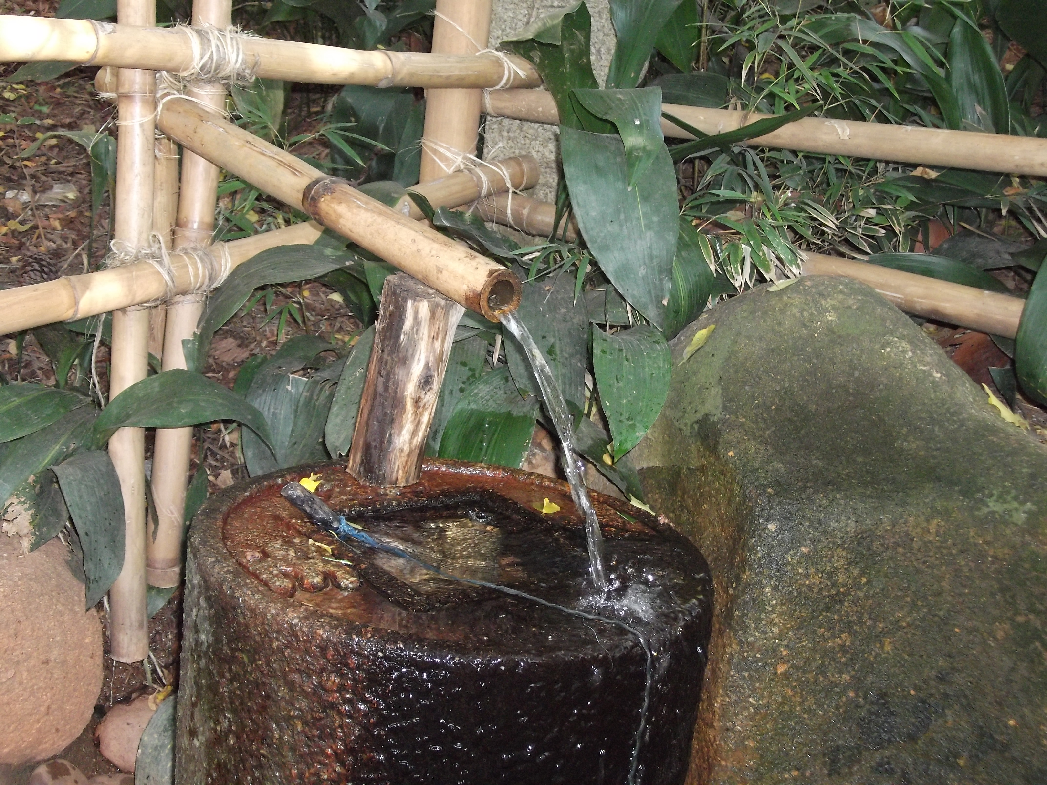 Praça Província de Shiga